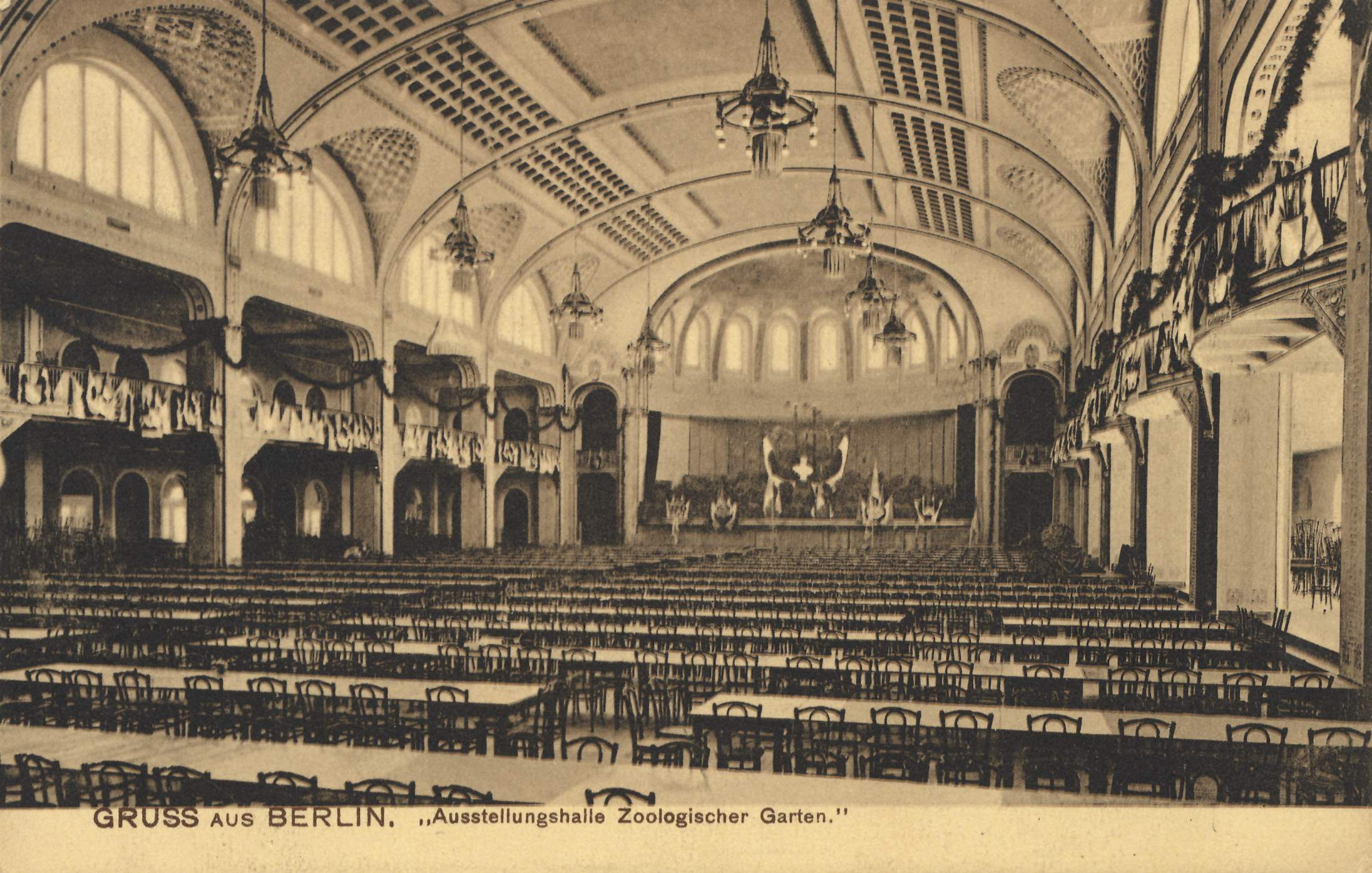 Ausstellungshallen am Zoologischen Garten, später Ufa-Palast am Zoo